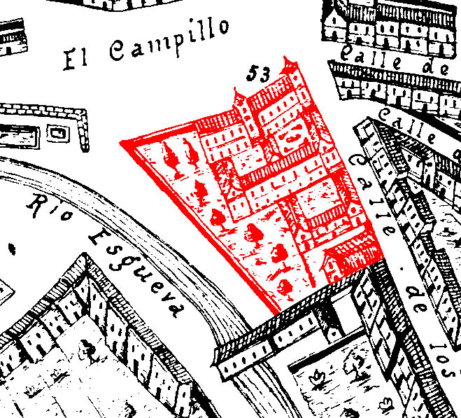 Información parcial del plano de Ventura Seco (1738). Señalado en rojo el edificio ya desaparecido del convento de San Felipe de la Penitencia, de la ciudad de Valladolid en España.